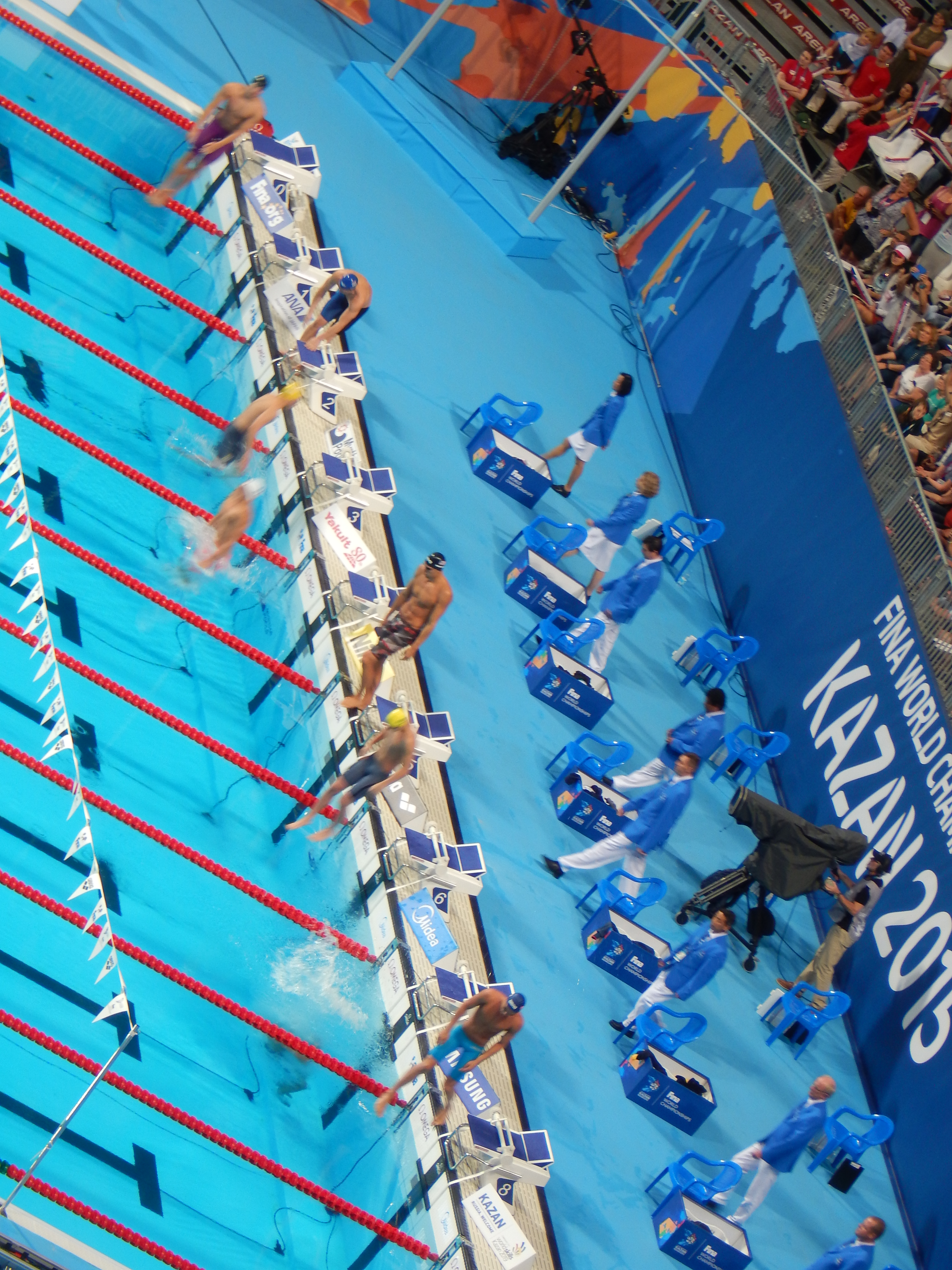 Финал на чемпионате мира по плаванию на дистанции 50 метров на спине